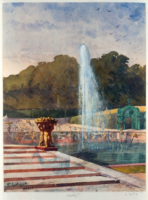 Marly. (Vue d'un bassin avec jet d'eau), dessin de Guillaumot, Auguste Alexandre (1815-1892)